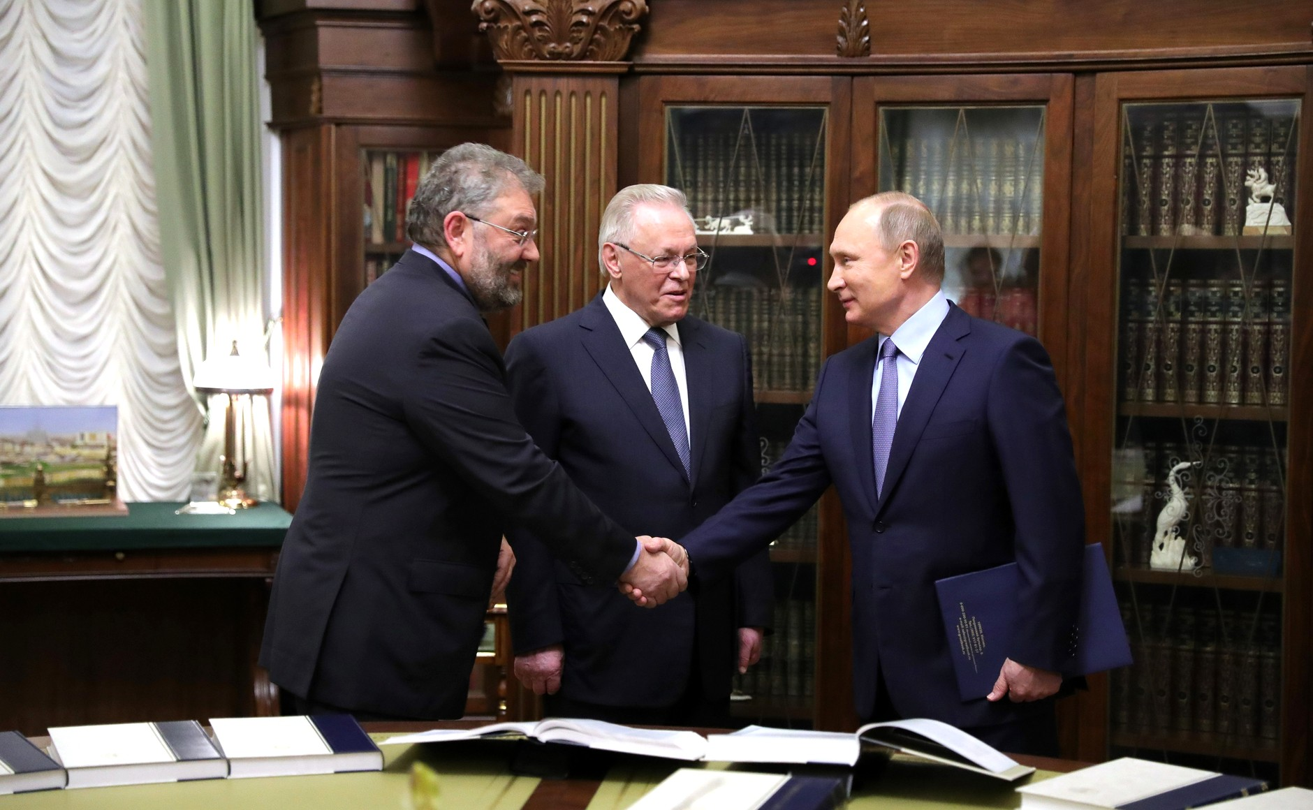 Академик РАН Юрий Осипов и ответственный редактор издательства «Большая российская энциклопедия» Сергей Кравец представили Владимиру Путину состоящее из 35 томов собрание Большой российской энциклопедии. С академиком РАН Юрием Осиповым (в центре) и ответственным редактором «Большой российской энциклопедии» Сергеем Кравцом.